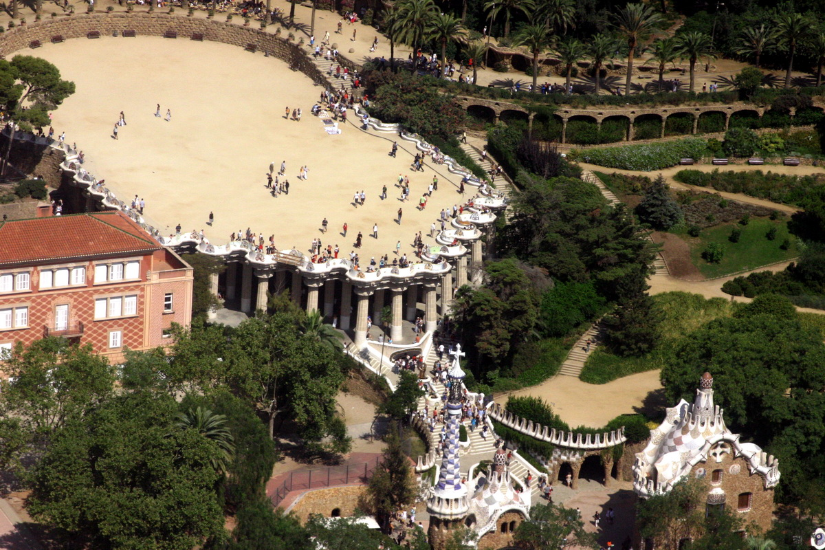 Vista aèria de la plaça central del Parc Güell.